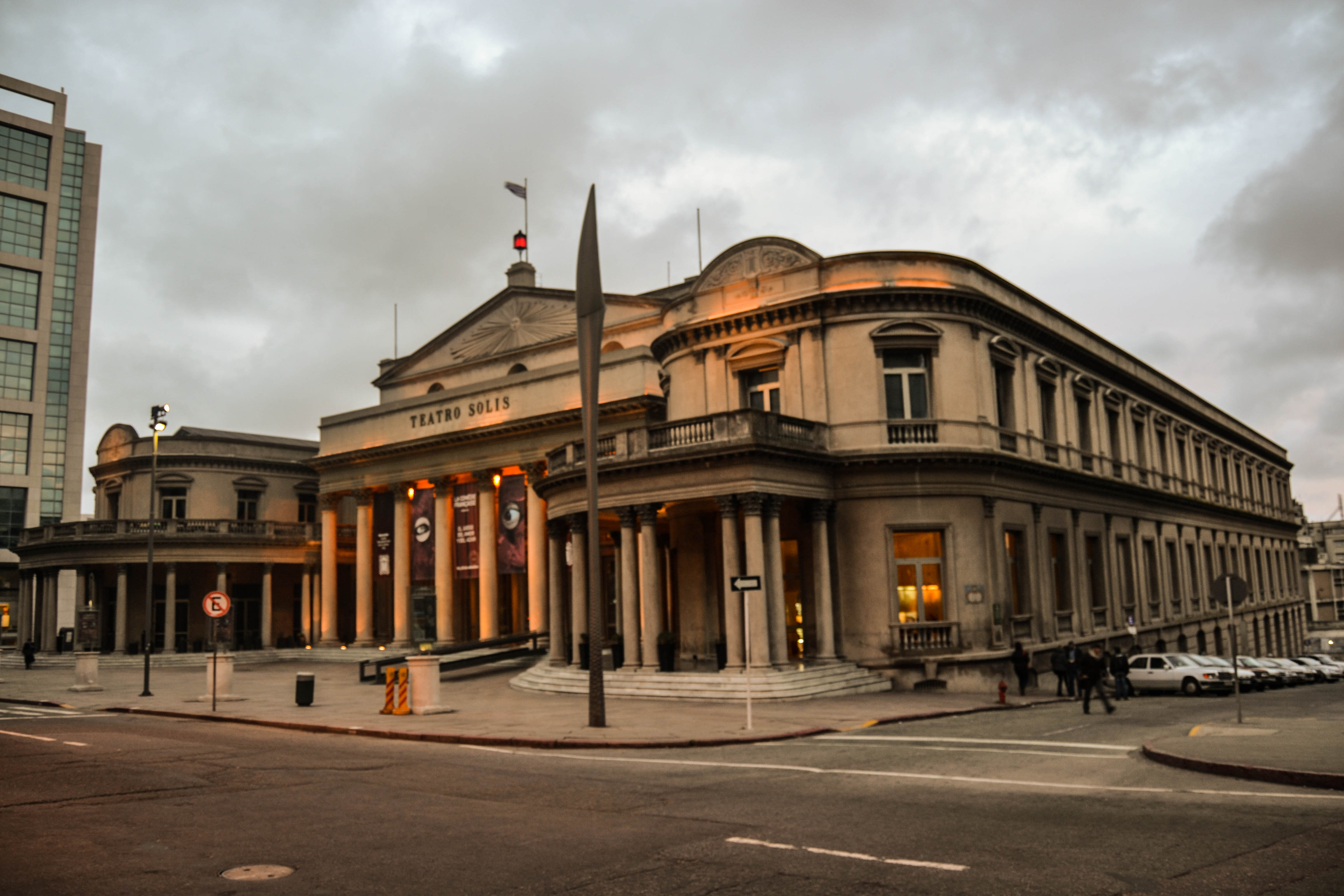 Teatro Solís. Ubicada en el departamento de Montevideo